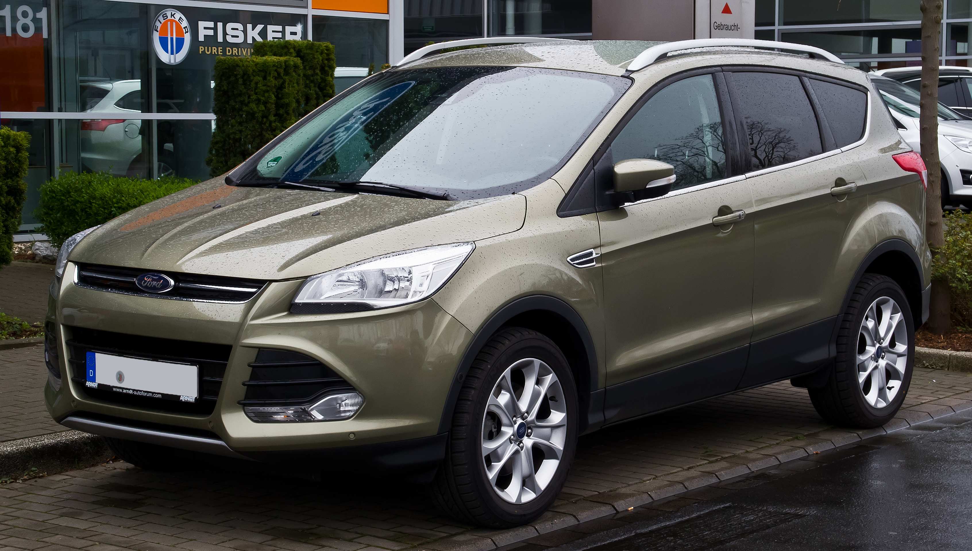 Ford Kuga Titanium (II)